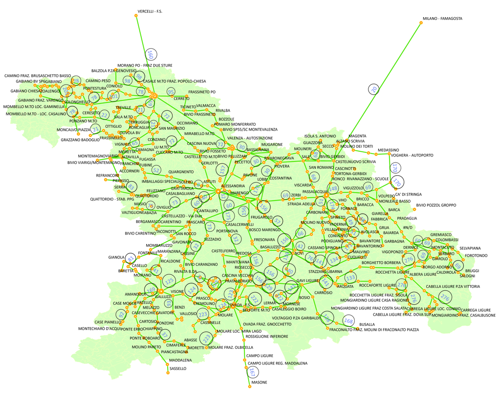 Linee S.C.A.T.